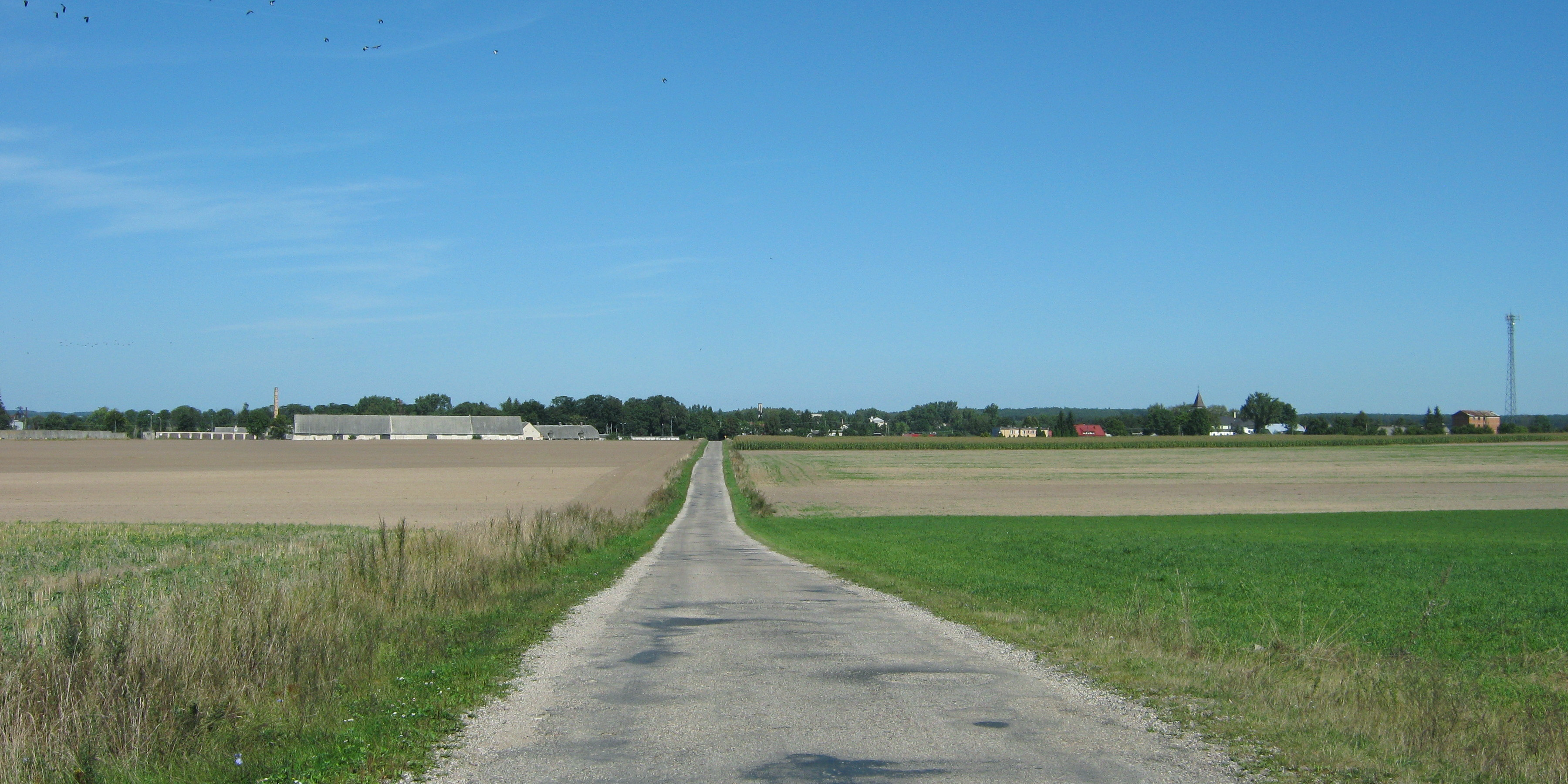 Grabowo południe